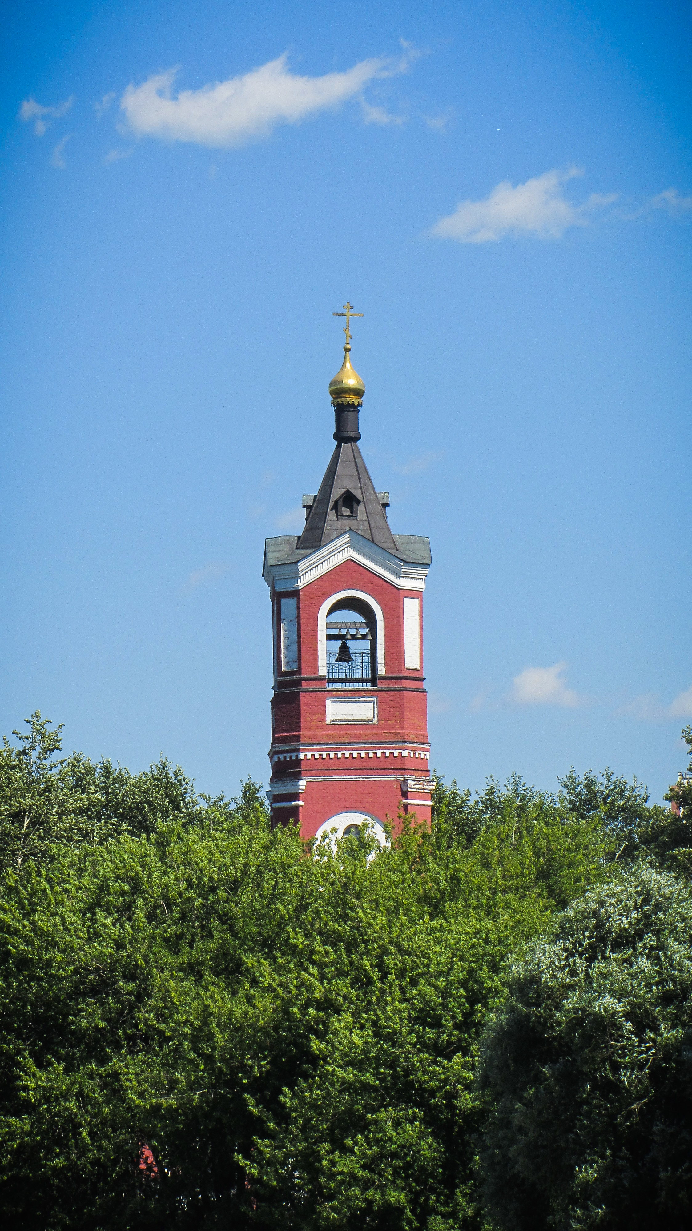 Колокольня храма Троицы Живоначальной в Борисове, вид с берега Борисовских прудов